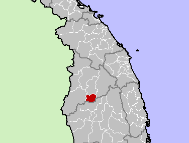 Kon Tum District, Kon Tum Province, Vietnam.